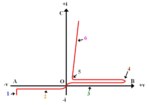 Caracteristique thyristor